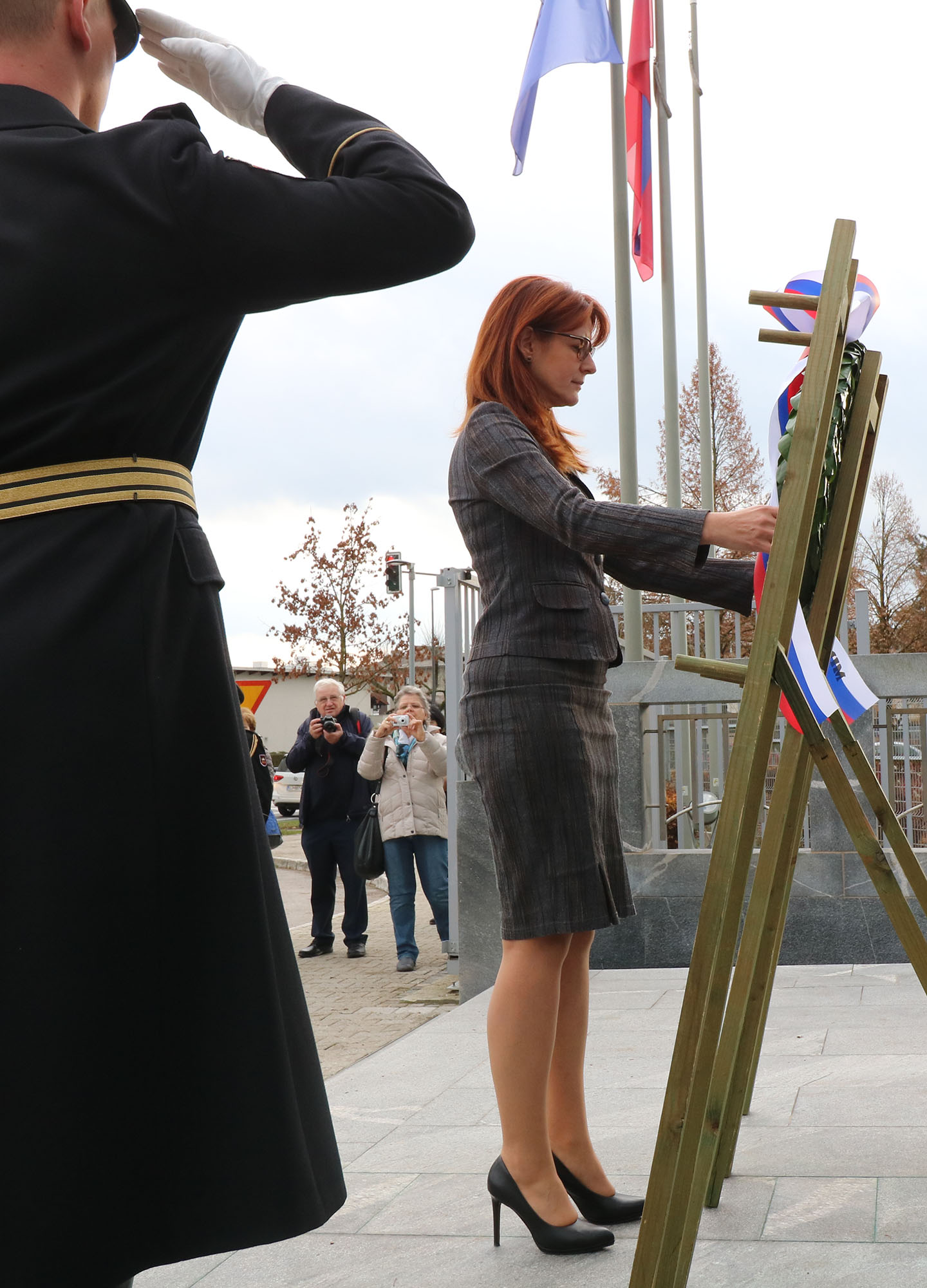 Na Ministrstvu za obrambo zaznamovali dan Rudolfa Maistra.